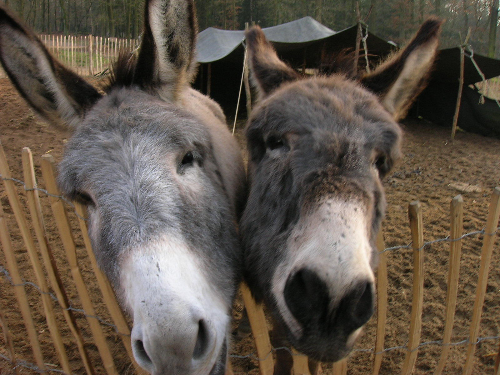 Ezels, Bijbels openluchtmuseum, Groesbeek